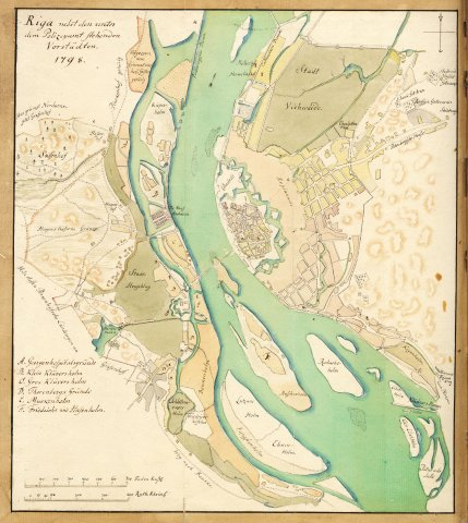 Scan from Johann Christoph Brotze's book Sammlung verschiedner Liefländischer Monumente. Riga nebst dem unter den Polizeyamt stehenden Vorstädten. 1798